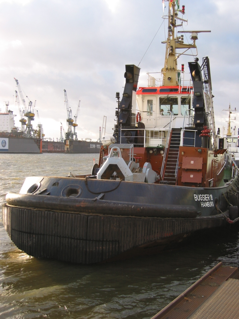 Schlepper Bugsier 18, Hamburg von achtern.